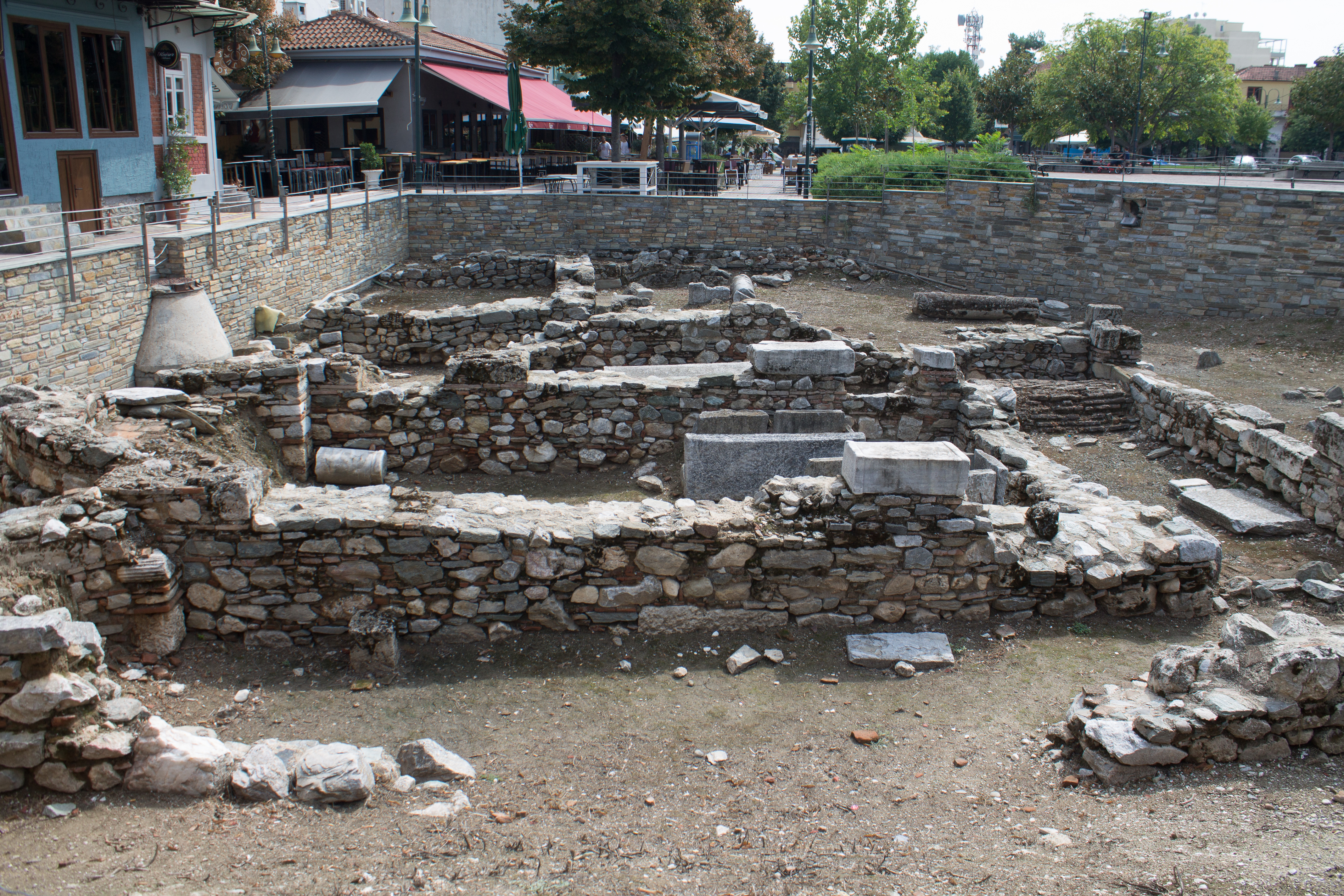 Βαλανείο«Αρχαιολογικός χώρος Φρουρίου Λάρισας»